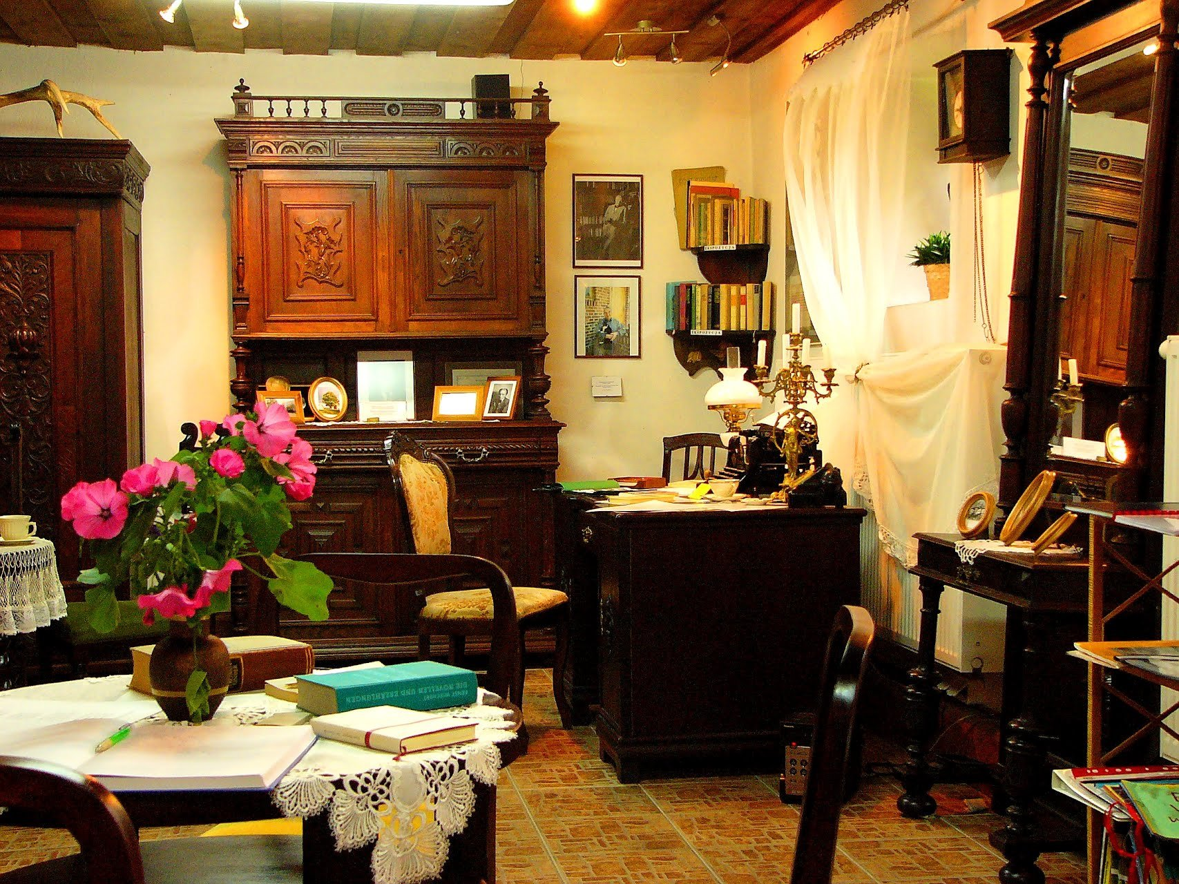 Piersławek - wnętrze leśniczówki